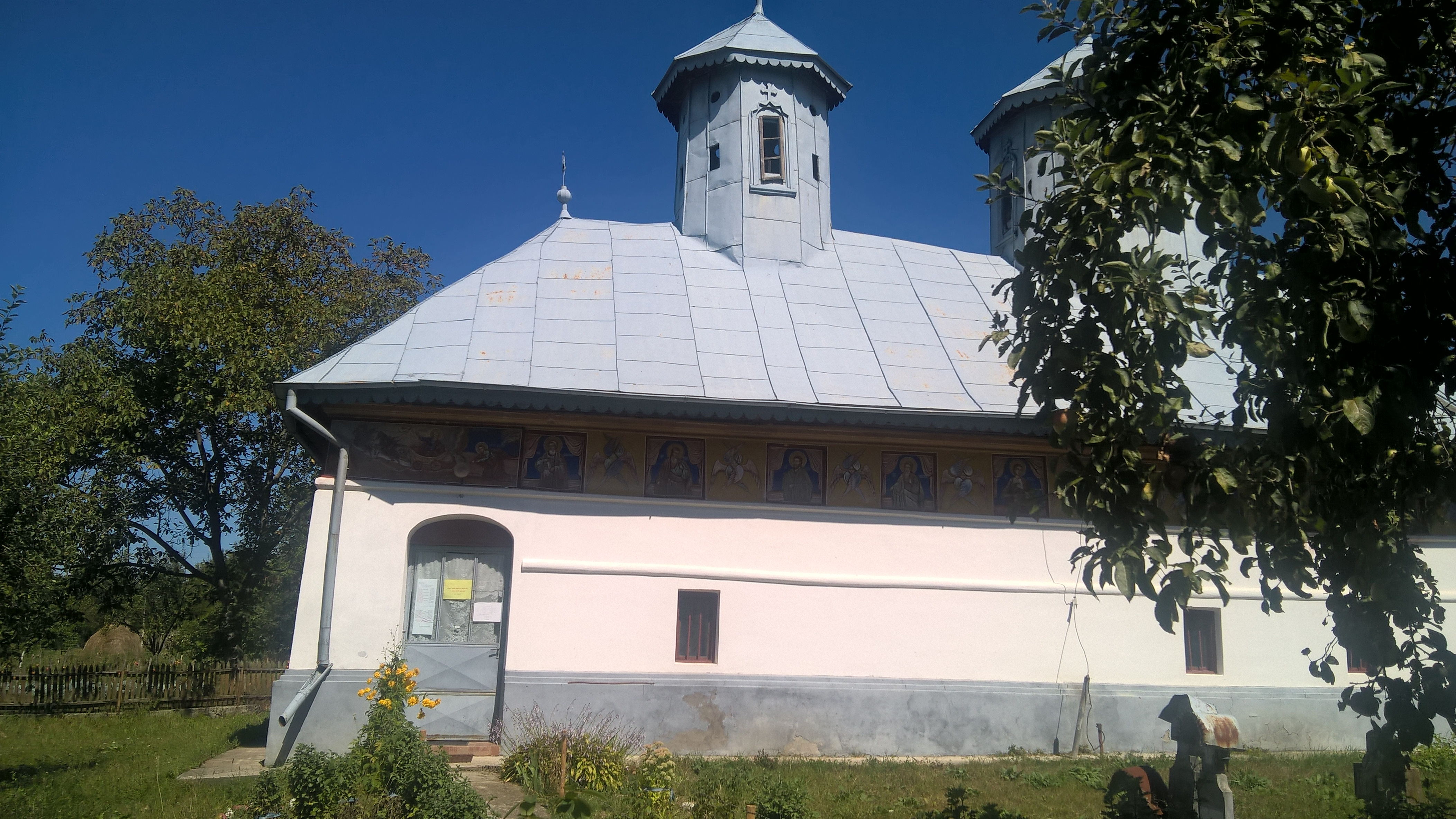 Biserica „Sf. Dumitru”